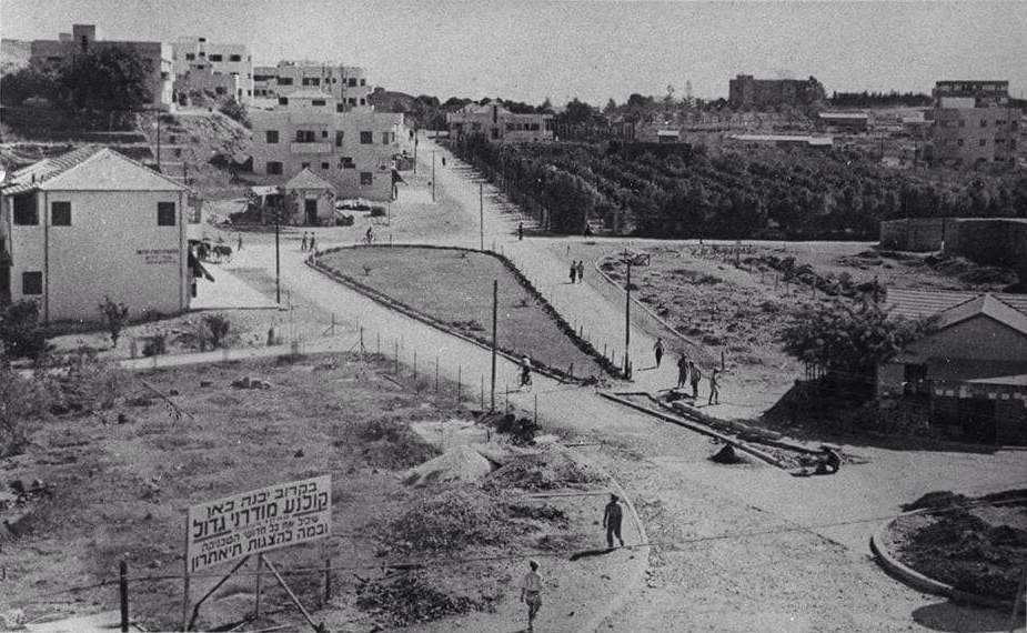 כיכר רמב"ם כולל השלט על הקמת קולנוע אורדע בכיכר רמב"ם